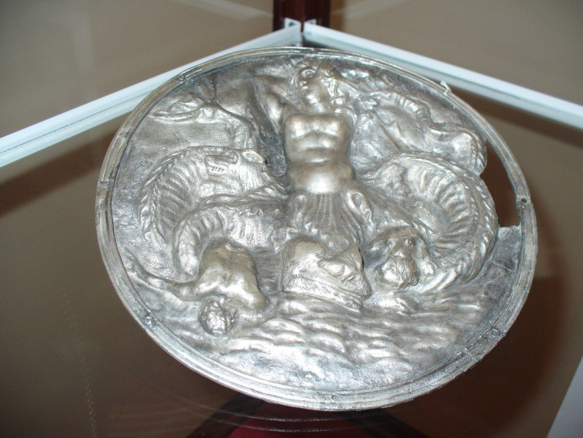 Серебряная вещь Мзымтинского клада